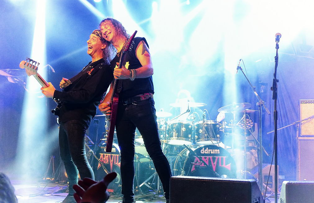 La banda de heavy metal canadiense Anvil, dando un concierto en Madrid.